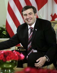 Micheil Saakaschwili, Präsident, Georgien